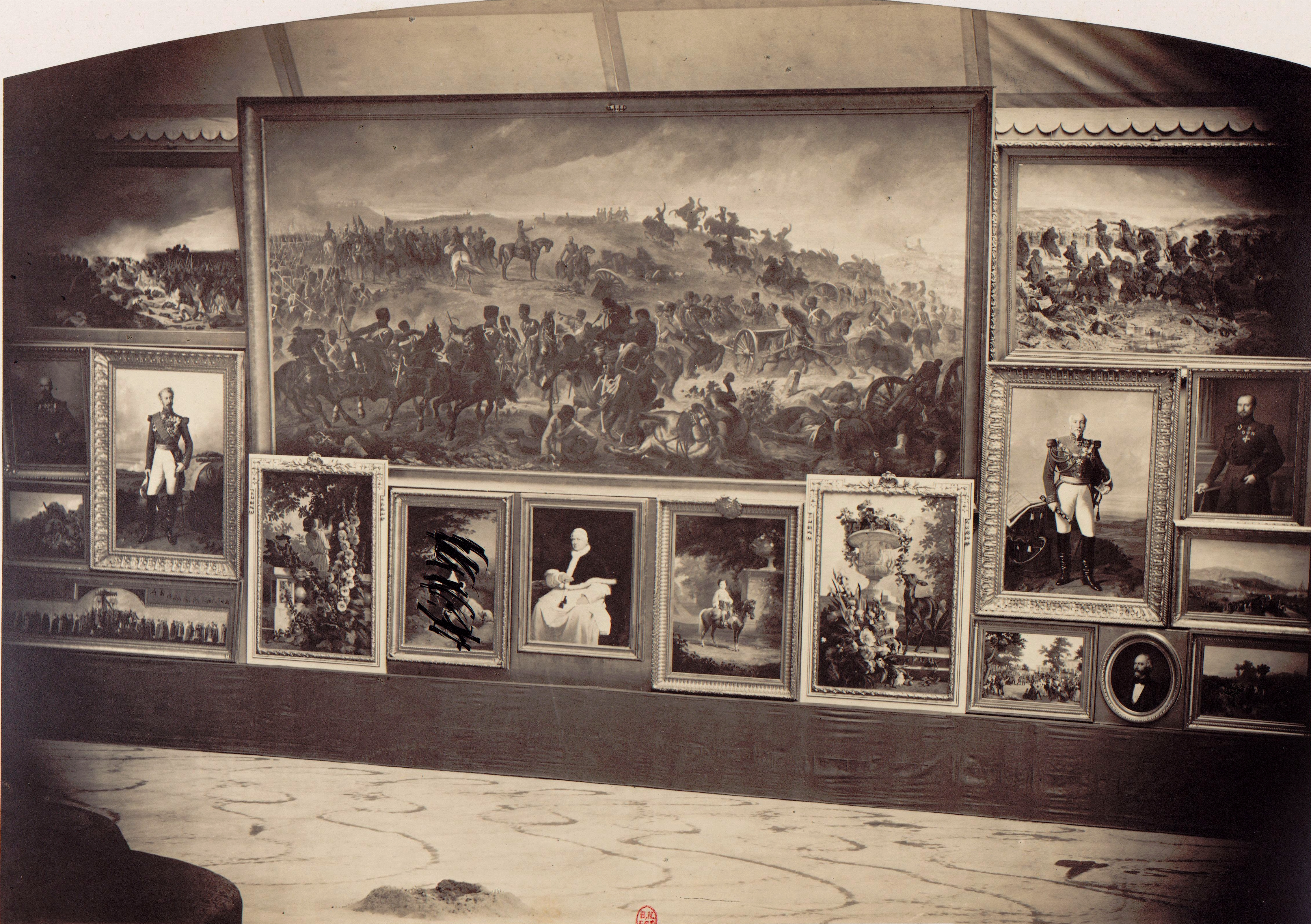 Hall des sculptures et cimaises du salon de 1861 (Palais de l'industrie), photographie de Pierre-Ambroise Richebourg, largeur du cliché : environ 27 cm. Vue n°8, extraite d'un album de 42 vues. BnF inv : FOL-AD-1104